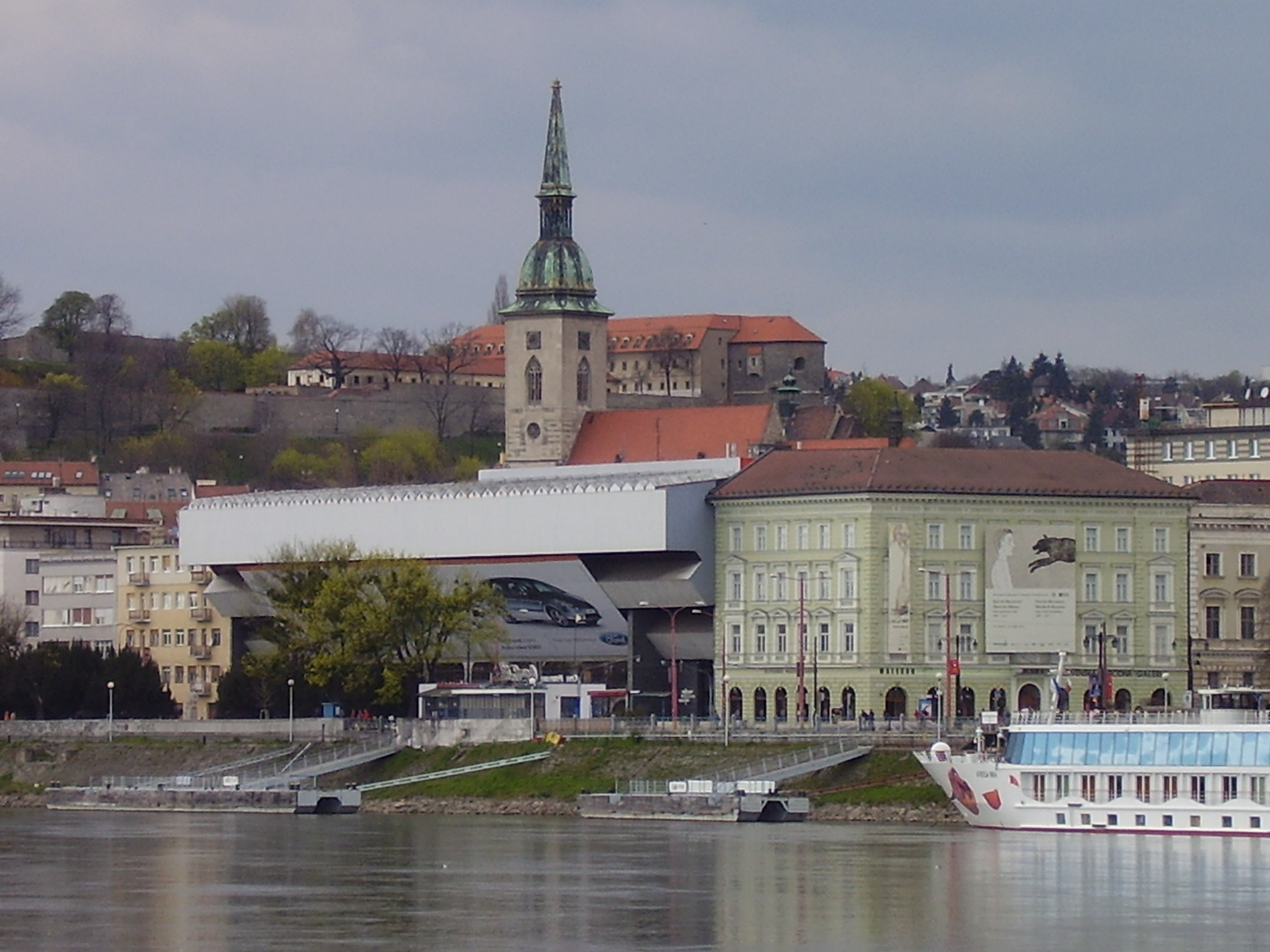 Bratislava riverfront